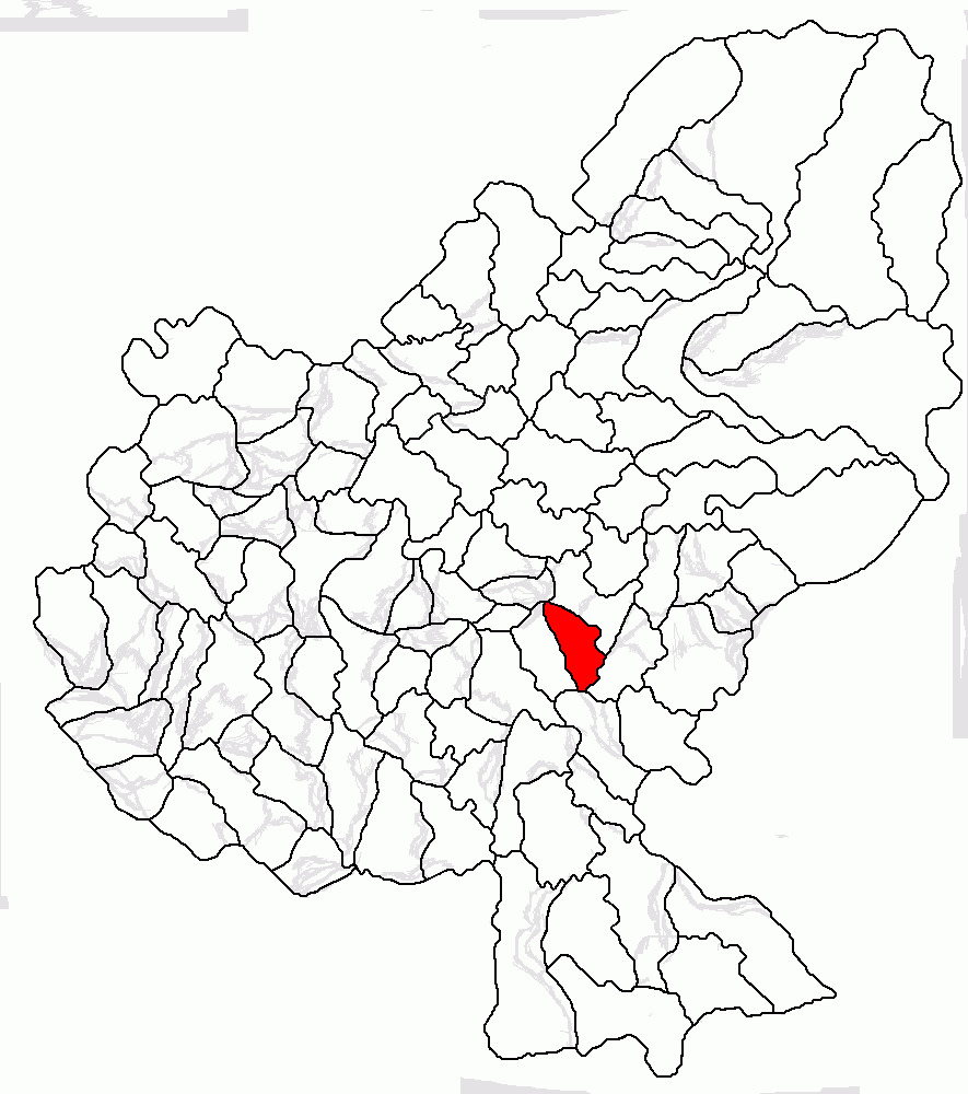 Categorie:Hărţi ale judeţului Mureş